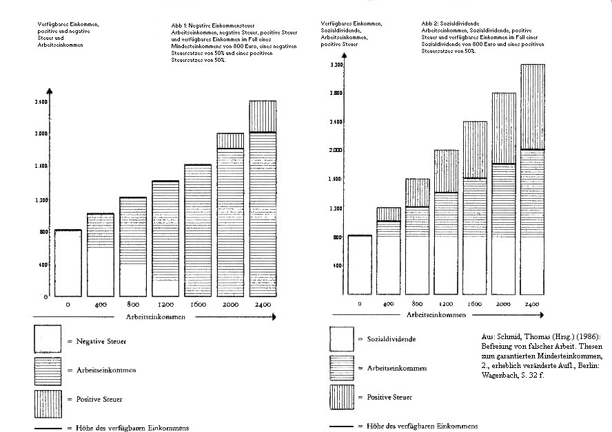 Wirkungsweise von Negativer Einkommensteuer und Sozialdividende